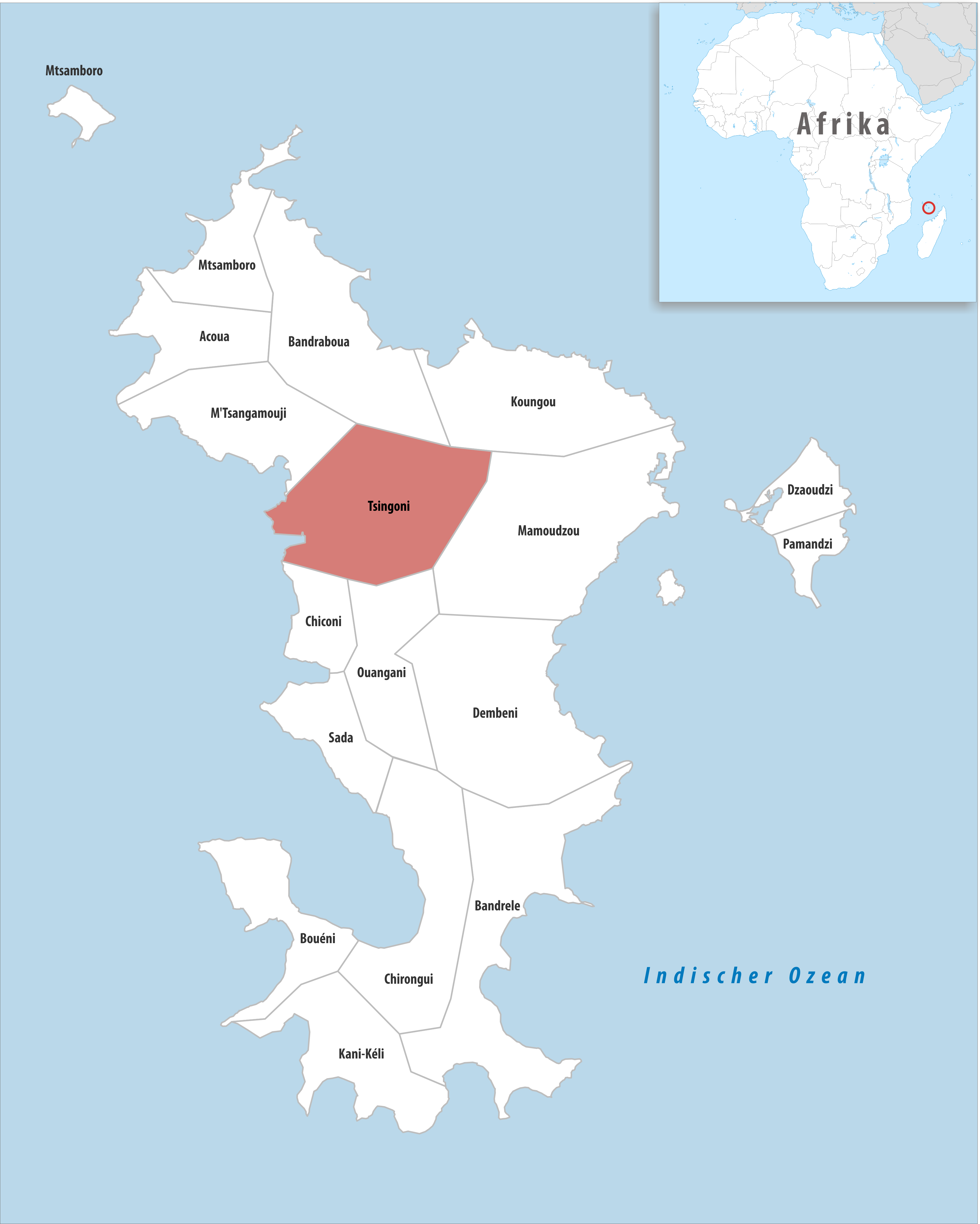 Lage der Gemeinde Tsingoni